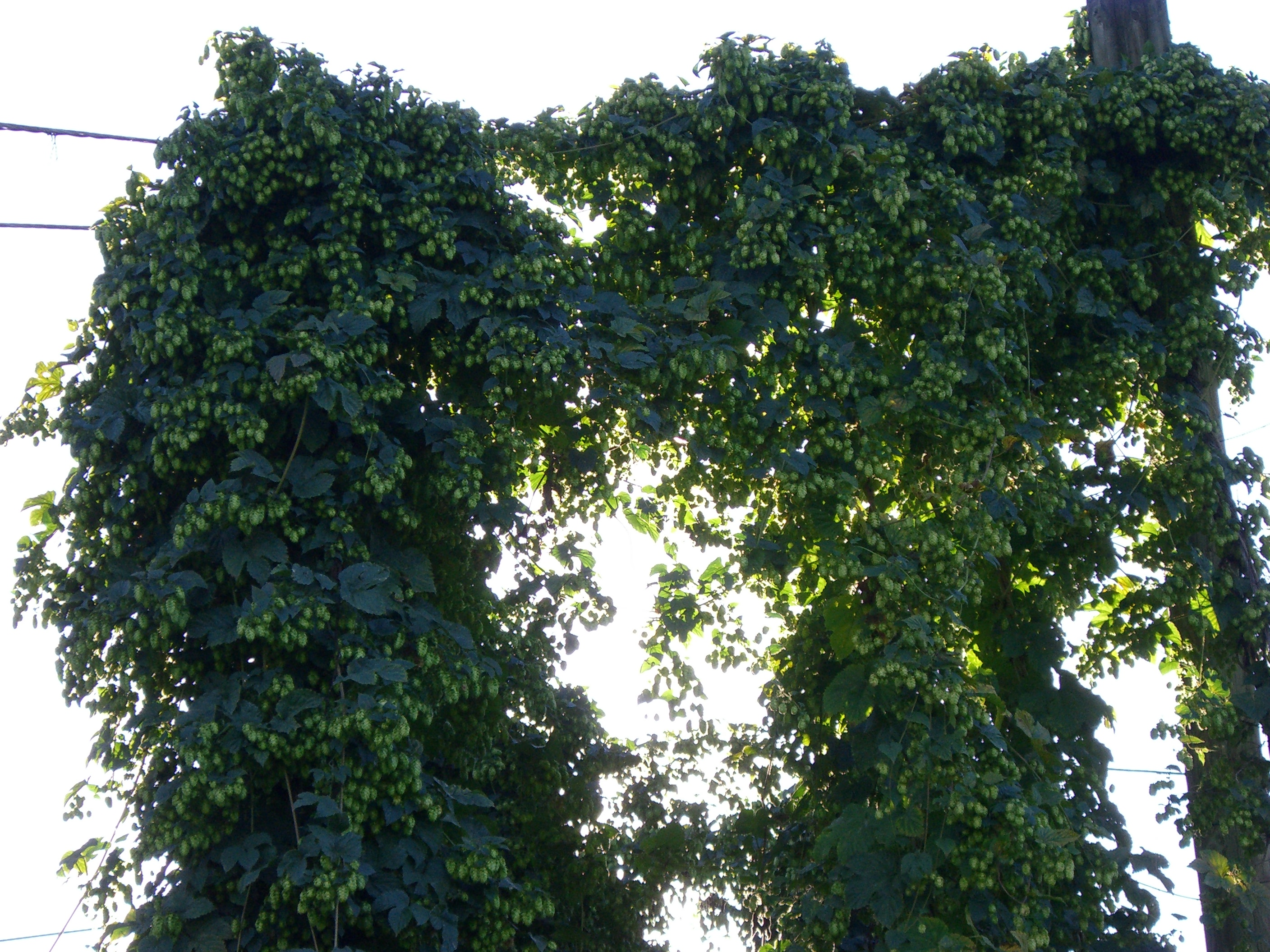 Hopfenreben